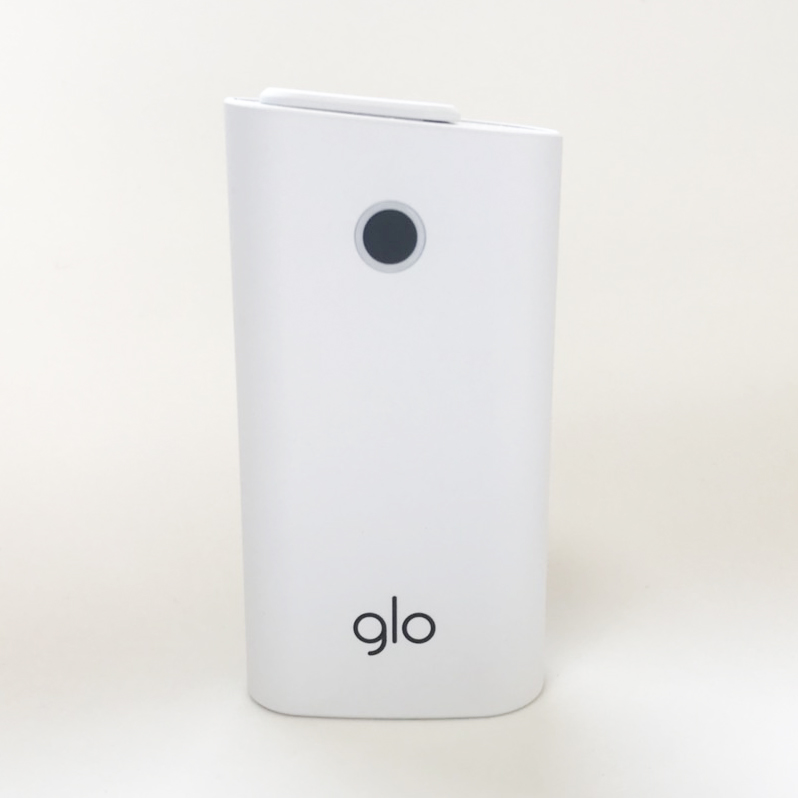 2018年2月限定発売モデル 日本国